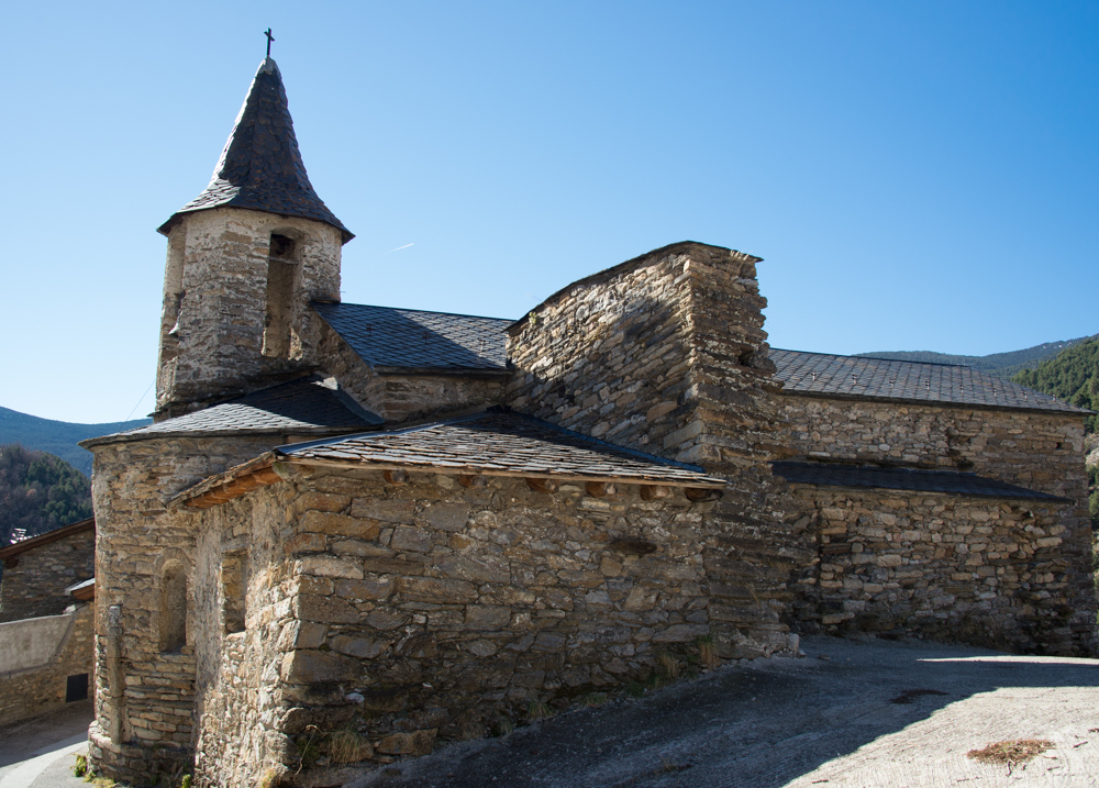 Església de Santa Eulàlia d'Asnurri (les Valls de Valira)